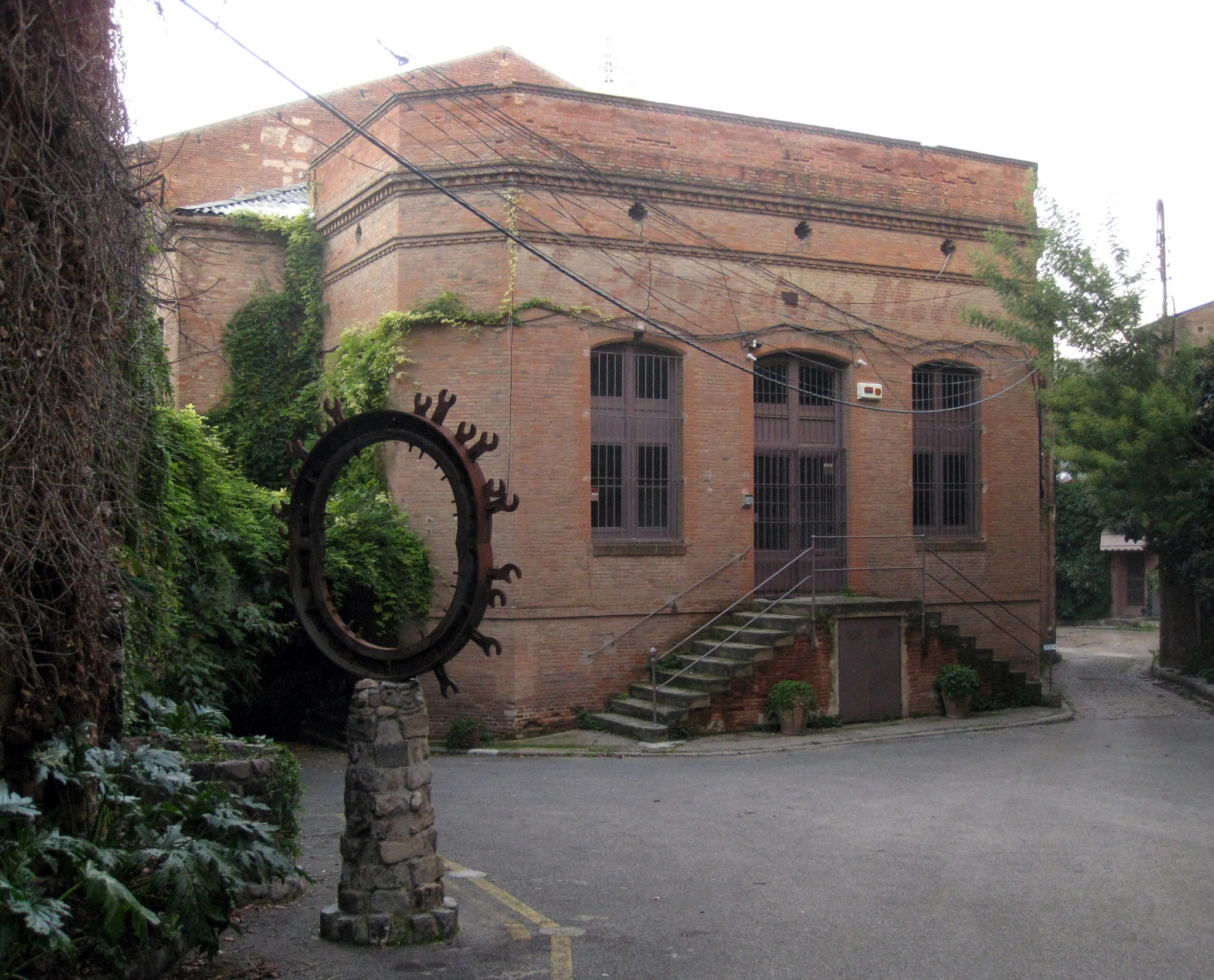 Quadra del Vapor Ros, al carrer del Portal Nou (Terrassa). Edifici de Lluís Muncunill del 1899.